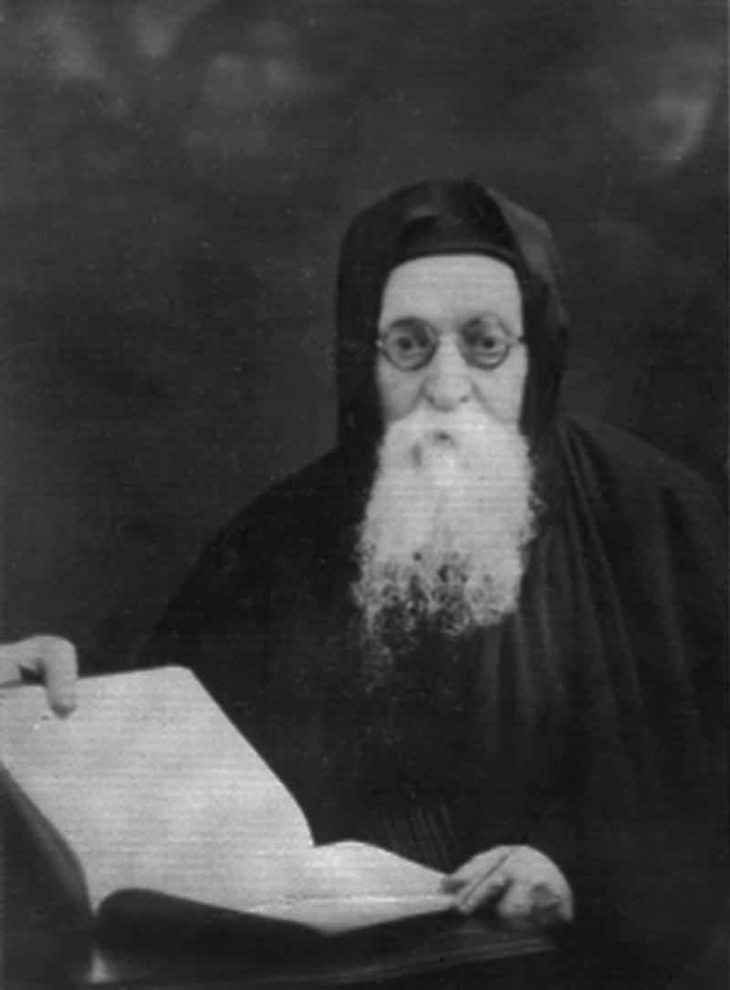 הרב דוד הכהן סקלי